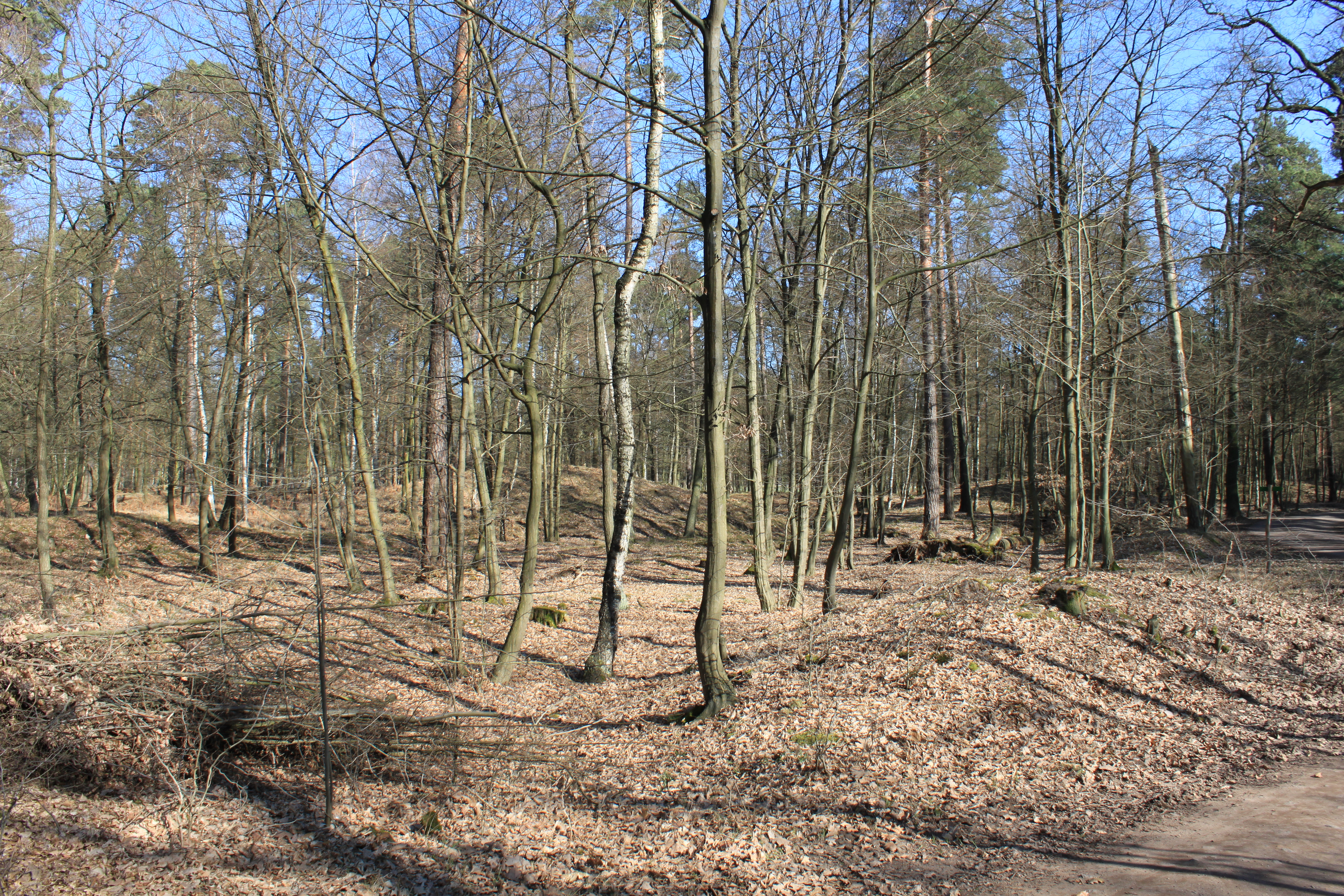 Das Hügelgräberfeld „Schweinert“ ist eines der bedeutendsten bronzezeitlichen Hügelgräberfelder in Mitteleuropa